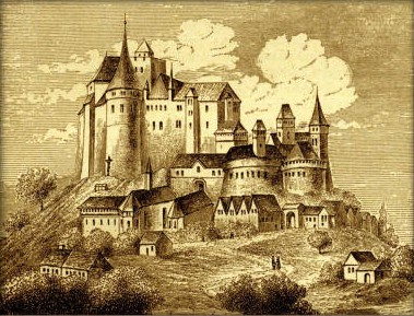 Česky: Hrad Rábí na rytině z roku 1708